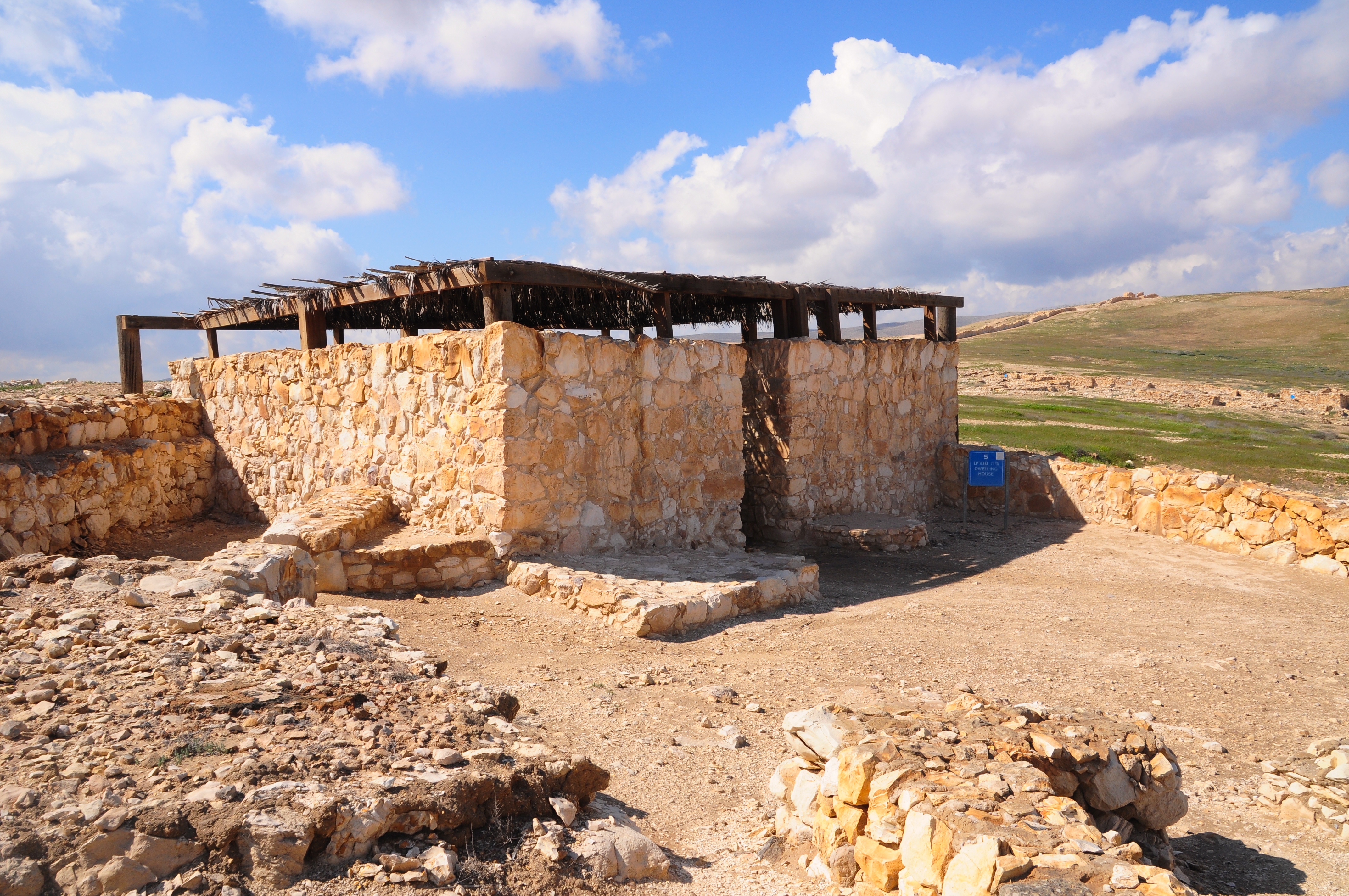 Tel Arad